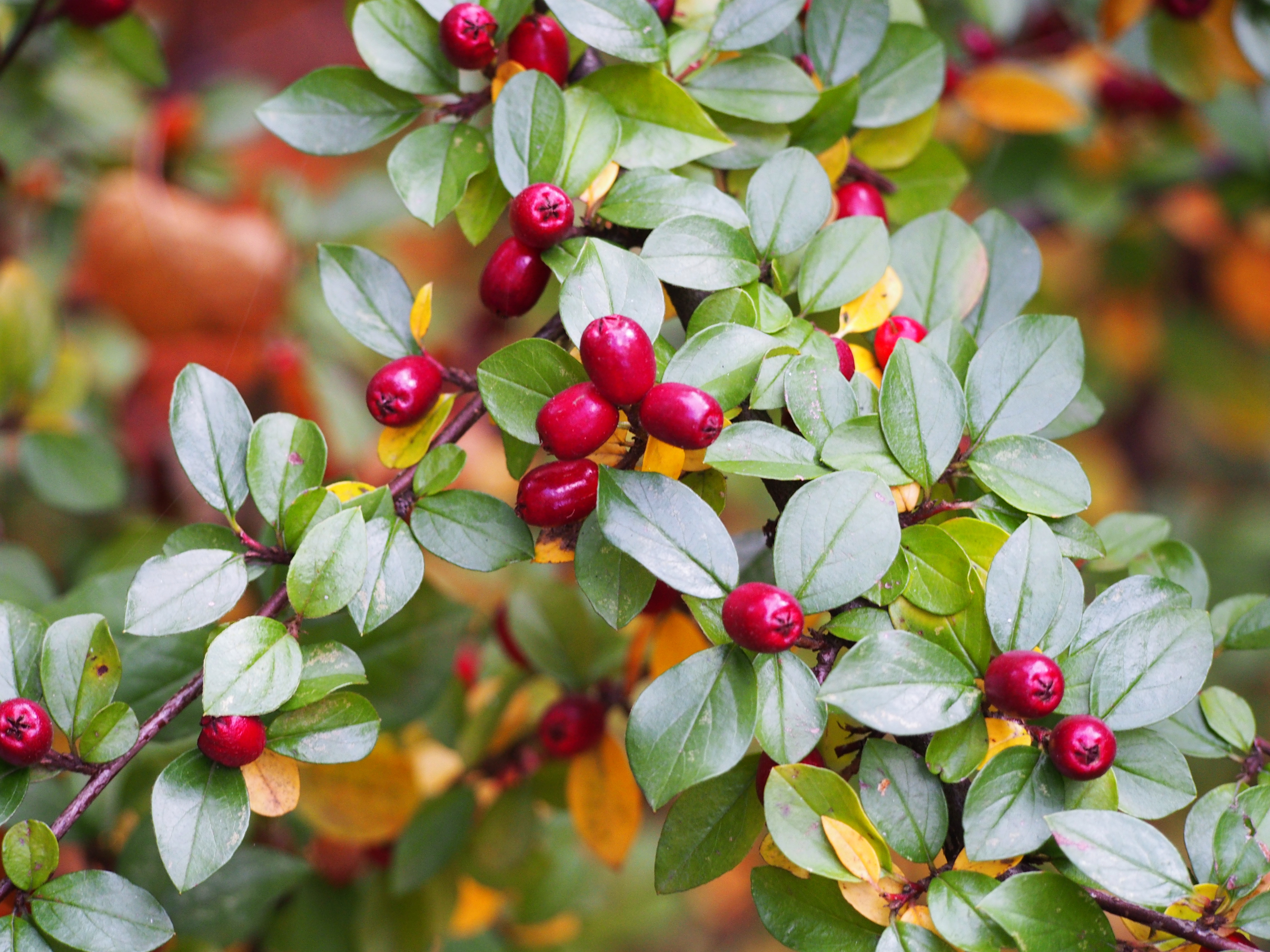 Irga chińska (Cotoneaster divaricatus) , owoce, okaz uprawiany. Ogród Botaniczny Uniwersytetu Wrocławskiego, Wrocław, Polska.